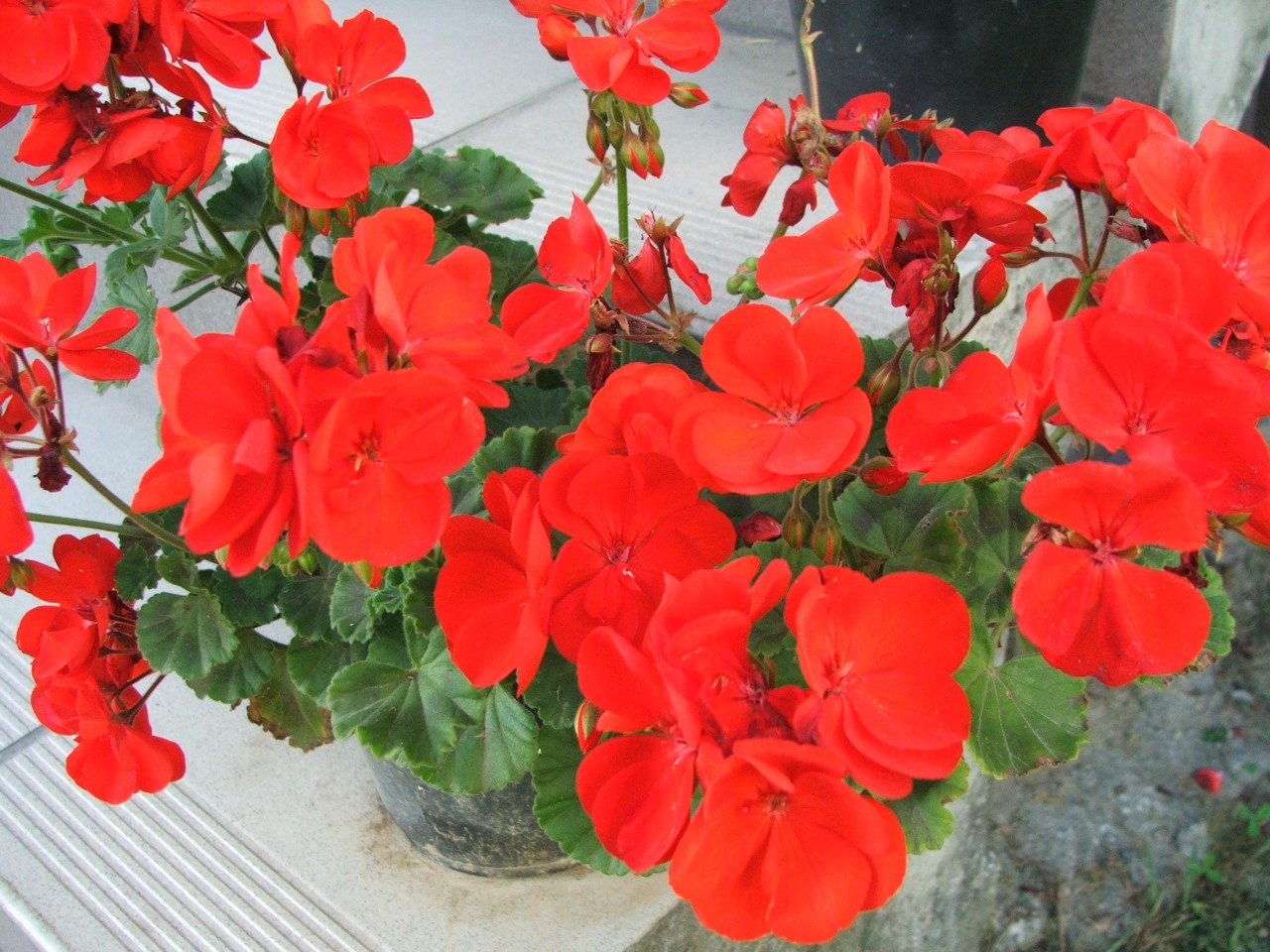 Pelargonium zonale hort.